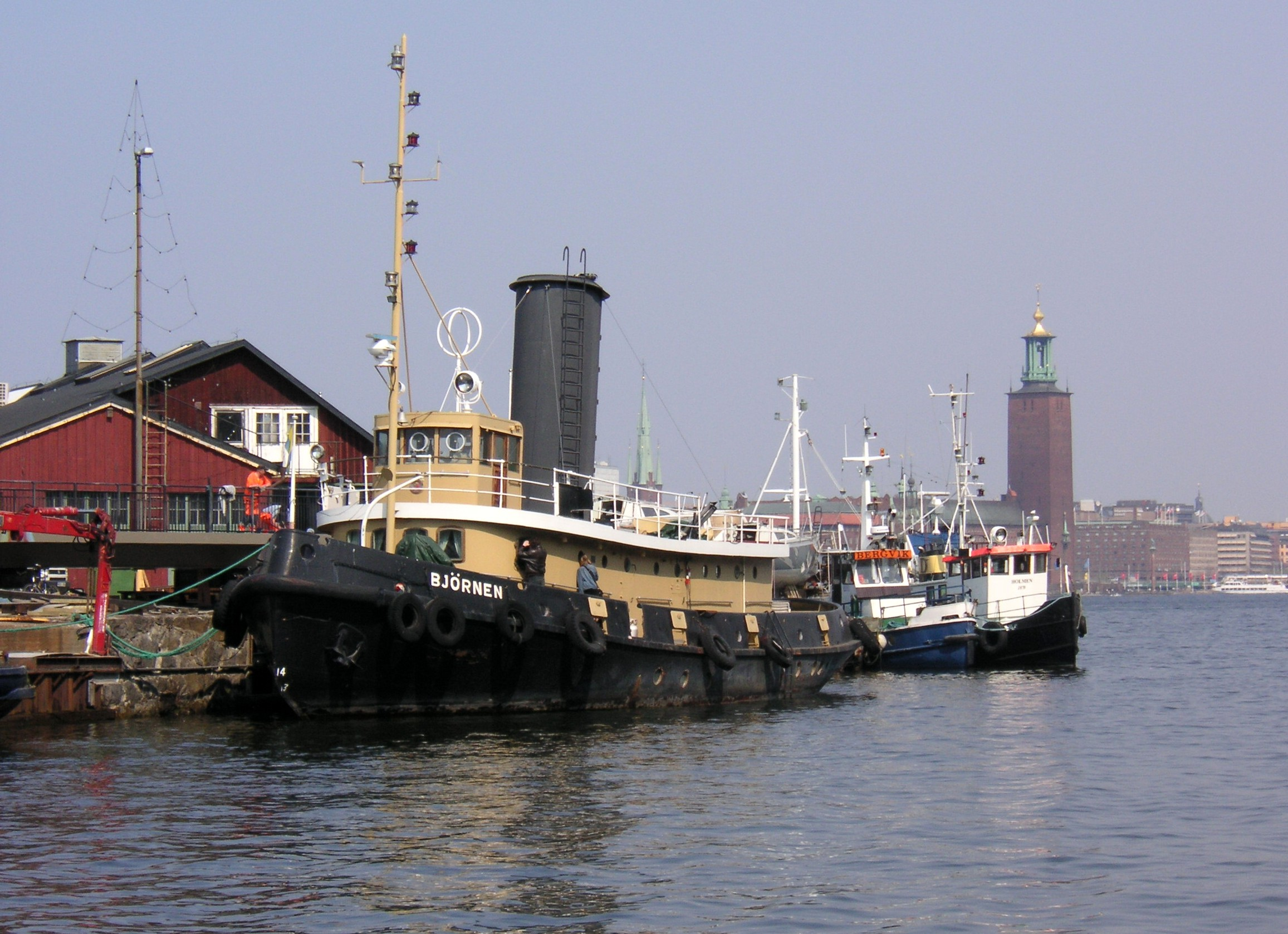 Bogserbåten Björnen vid Mälarvarvet i Stockholm